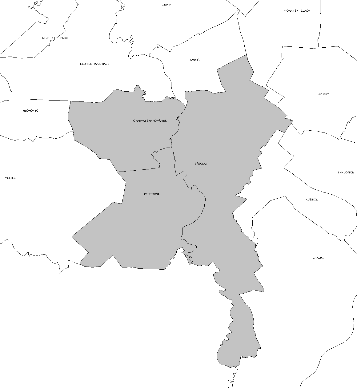 Katastrální členění Břeclavi